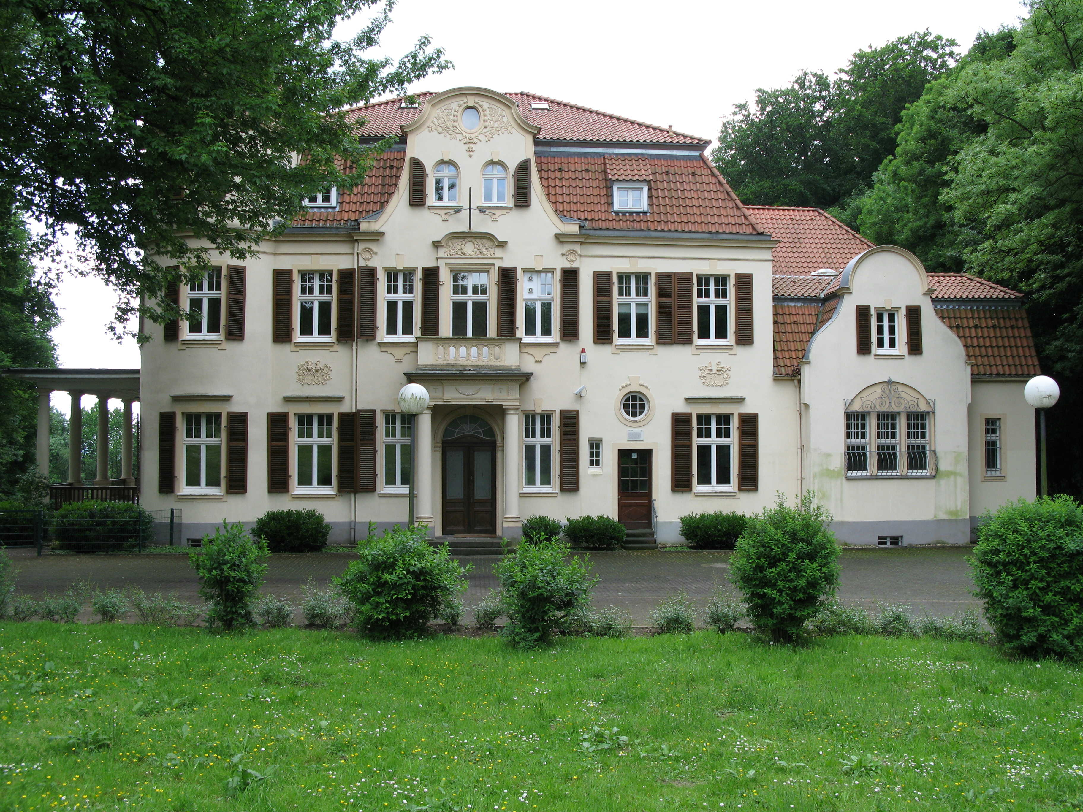 Villa Bayer - Vorne